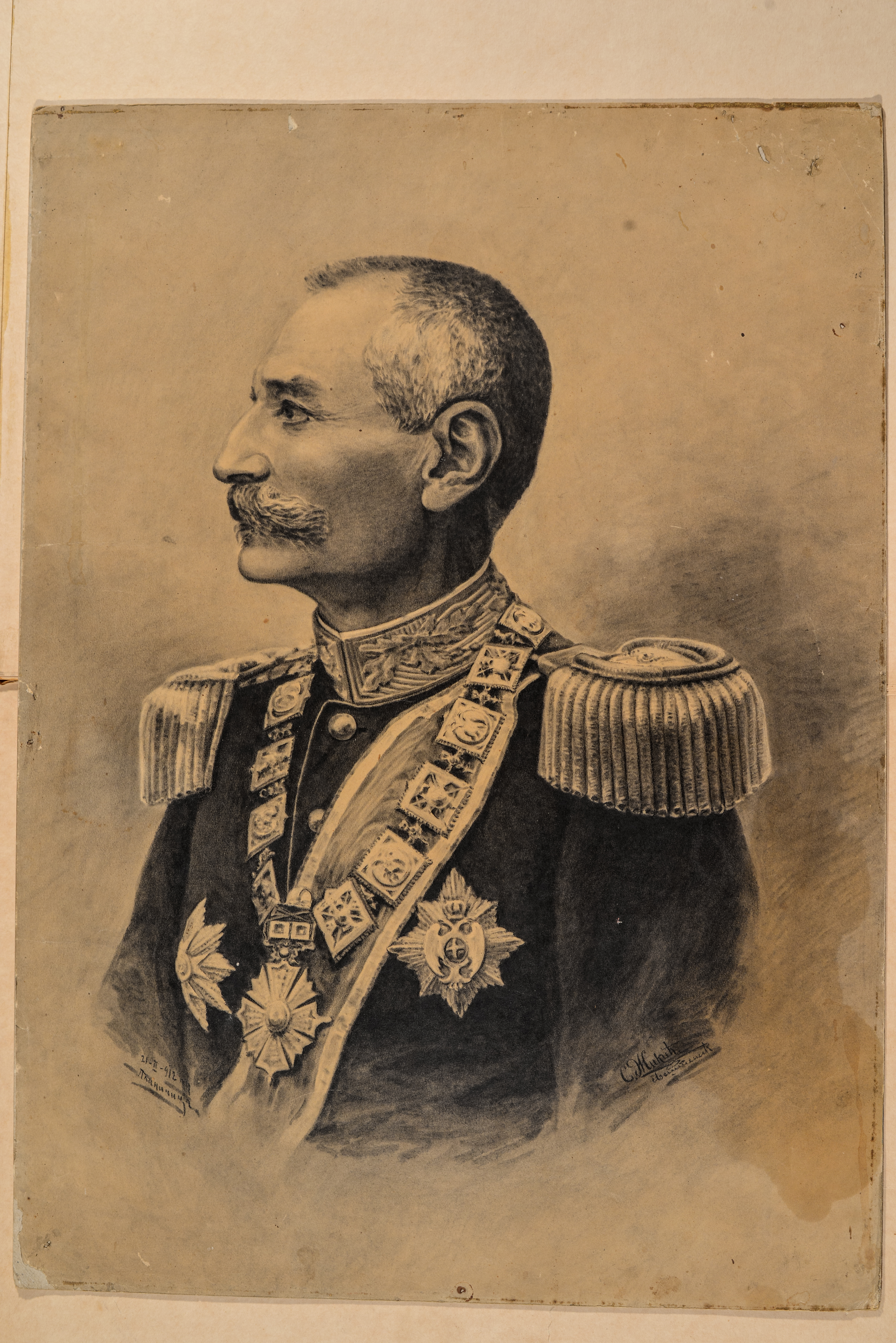 Sima Žikić, Kralj Petar I Karađorđević, 1912., crtež olovkom, 69,4x49,6.